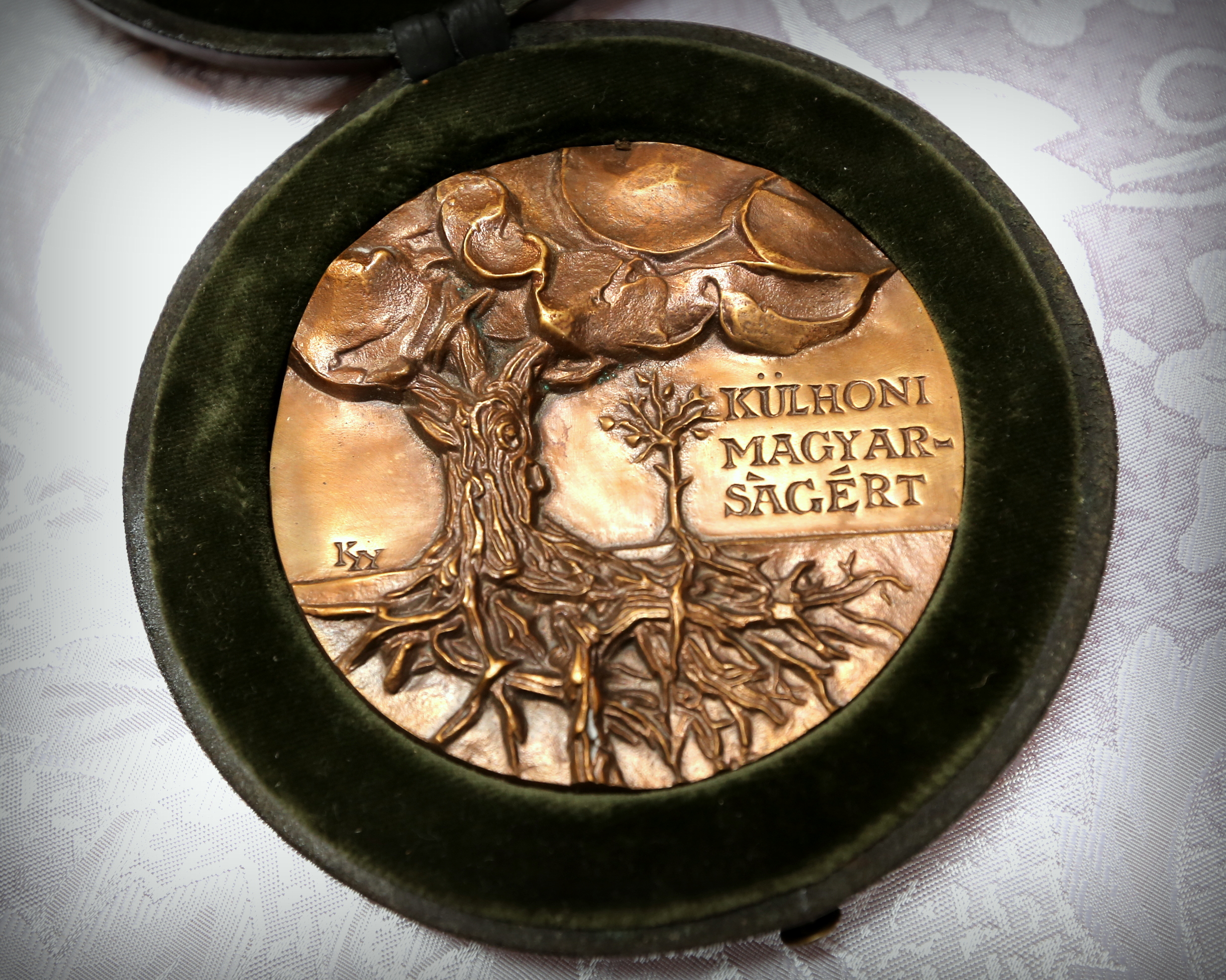 Külhoni Magyarságért Díj (bronz érem)